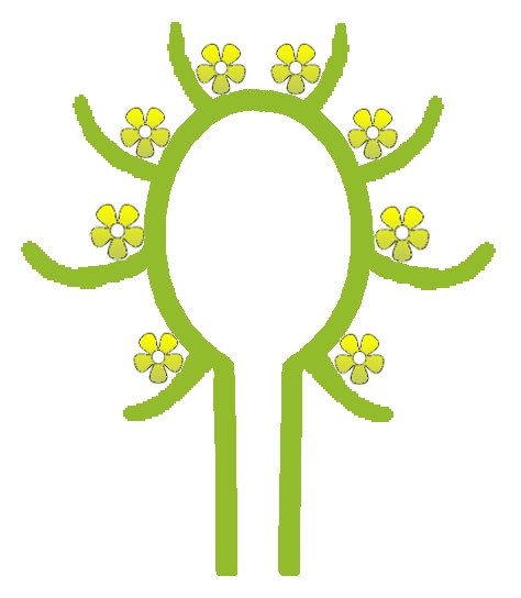 (nl: kegelvormig hoofdje) head